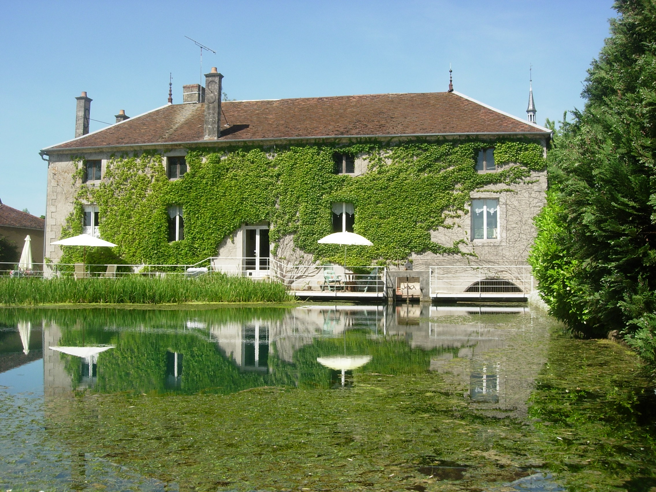 Résurgence de Soulaines-D'huys